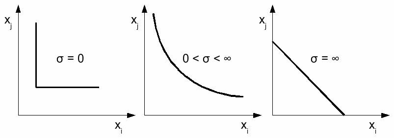 Três formatos típicos do gráfico da elasticidade de substituição entre os bens/serviços "i" e "j".